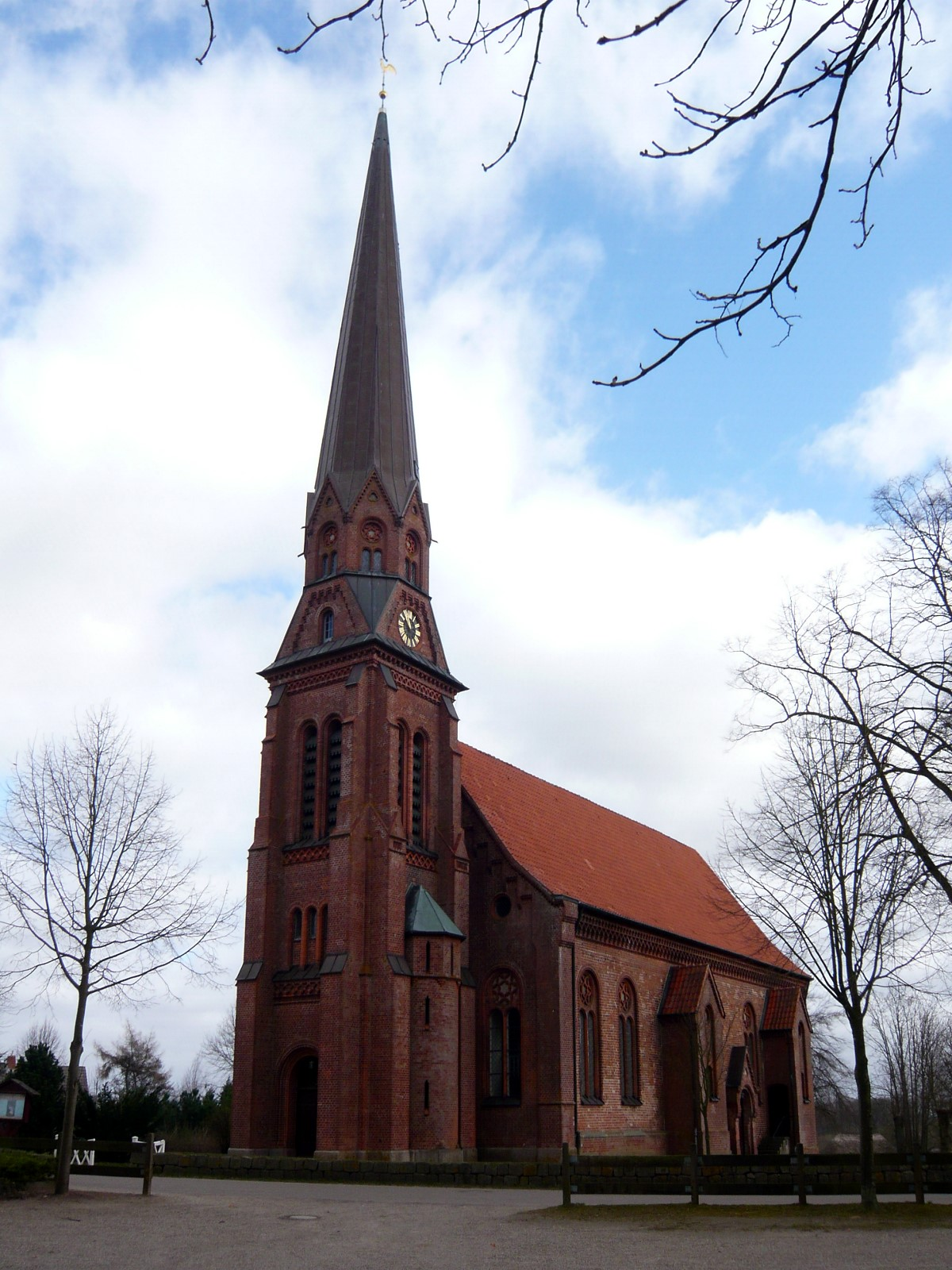 Kirche zu Lebrade